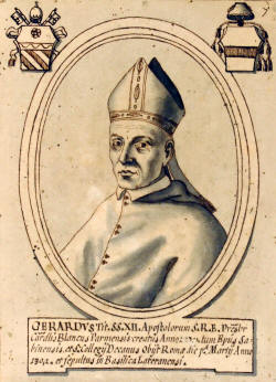 Cardeal Gerardo Bianchi